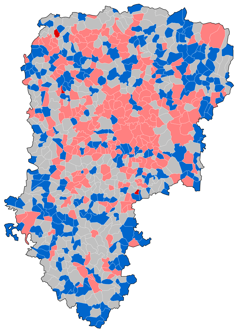 Résultat de l'élection présidentielle 2012 dans l'Aisne